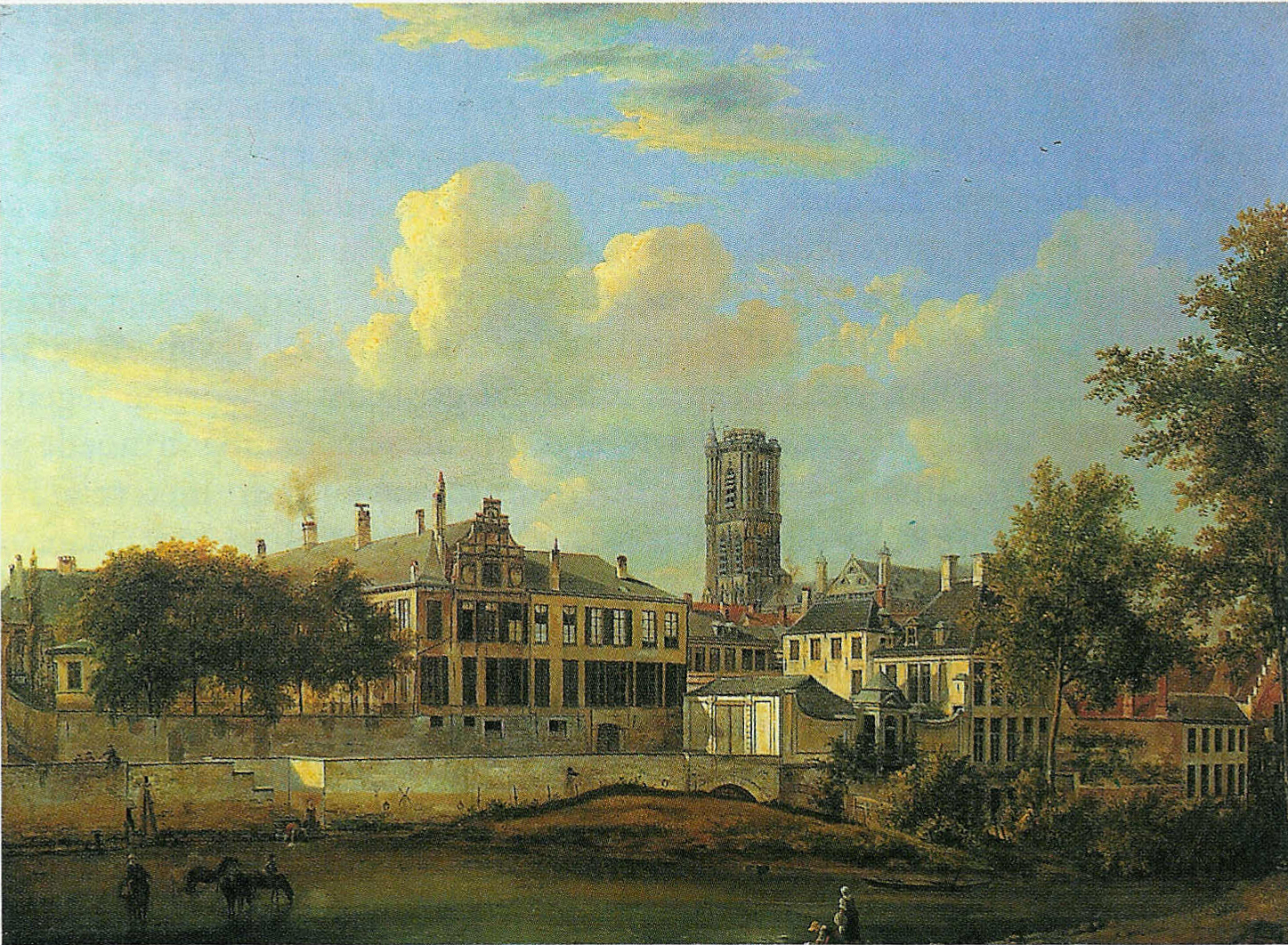 Het bisschoppelijk paleis in 1819, het voormalige Hof van Sint-Baafs - Gent - Oost-Vlaanderen - België